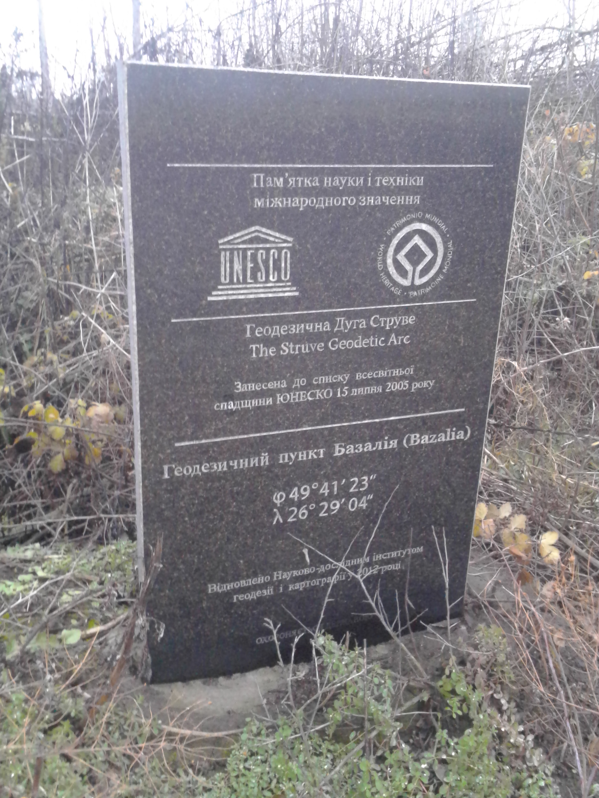 геодезичний пункт Базалія